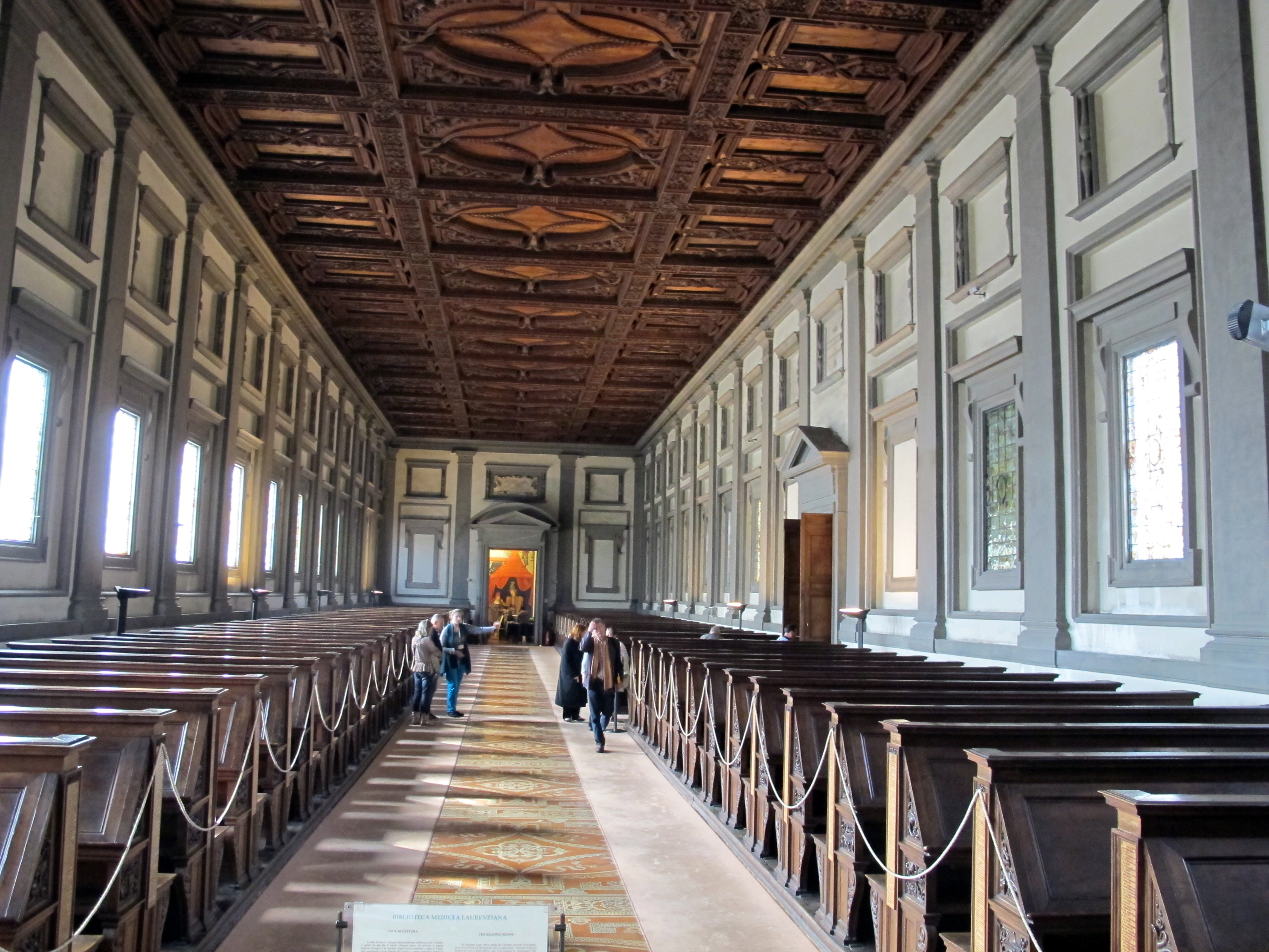 Biblioteca laurenziana, sala lettura